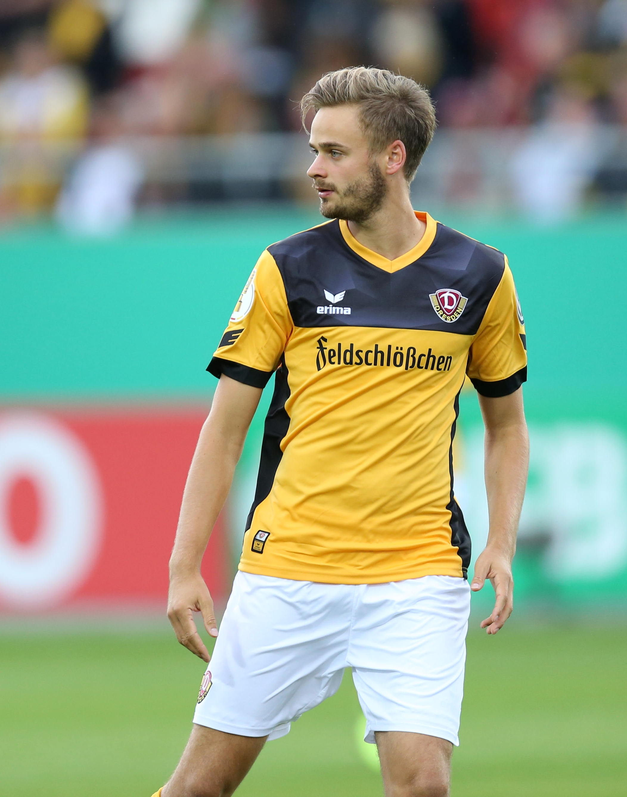 DFB-Pokal 2017/18, 1. Hauptrunde, TuS Koblenz gegen SG Dynamo Dresden: Lucas Röser (SG Dynamo Dresden)